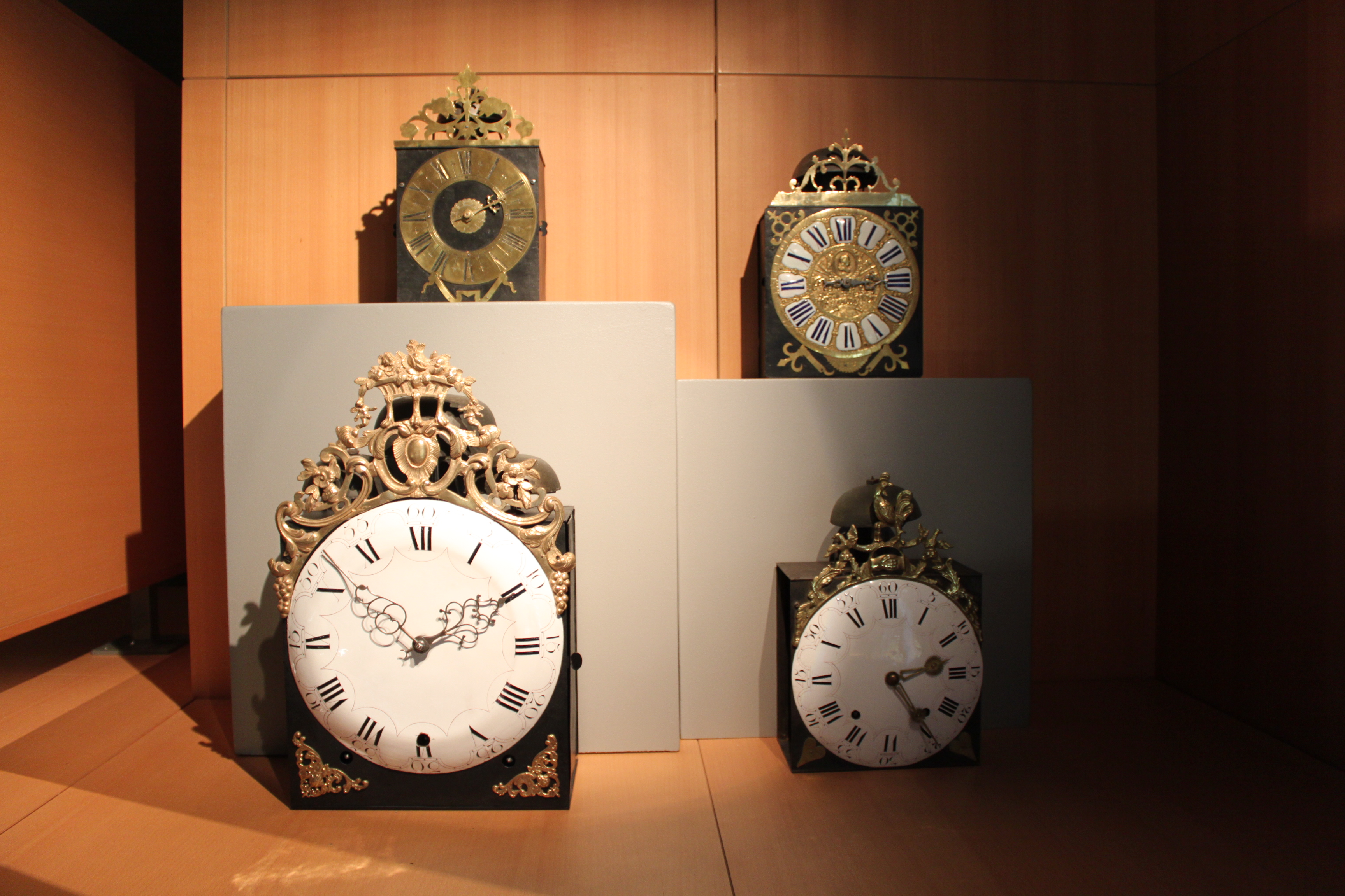 Musée de la lunette, Morez, France.